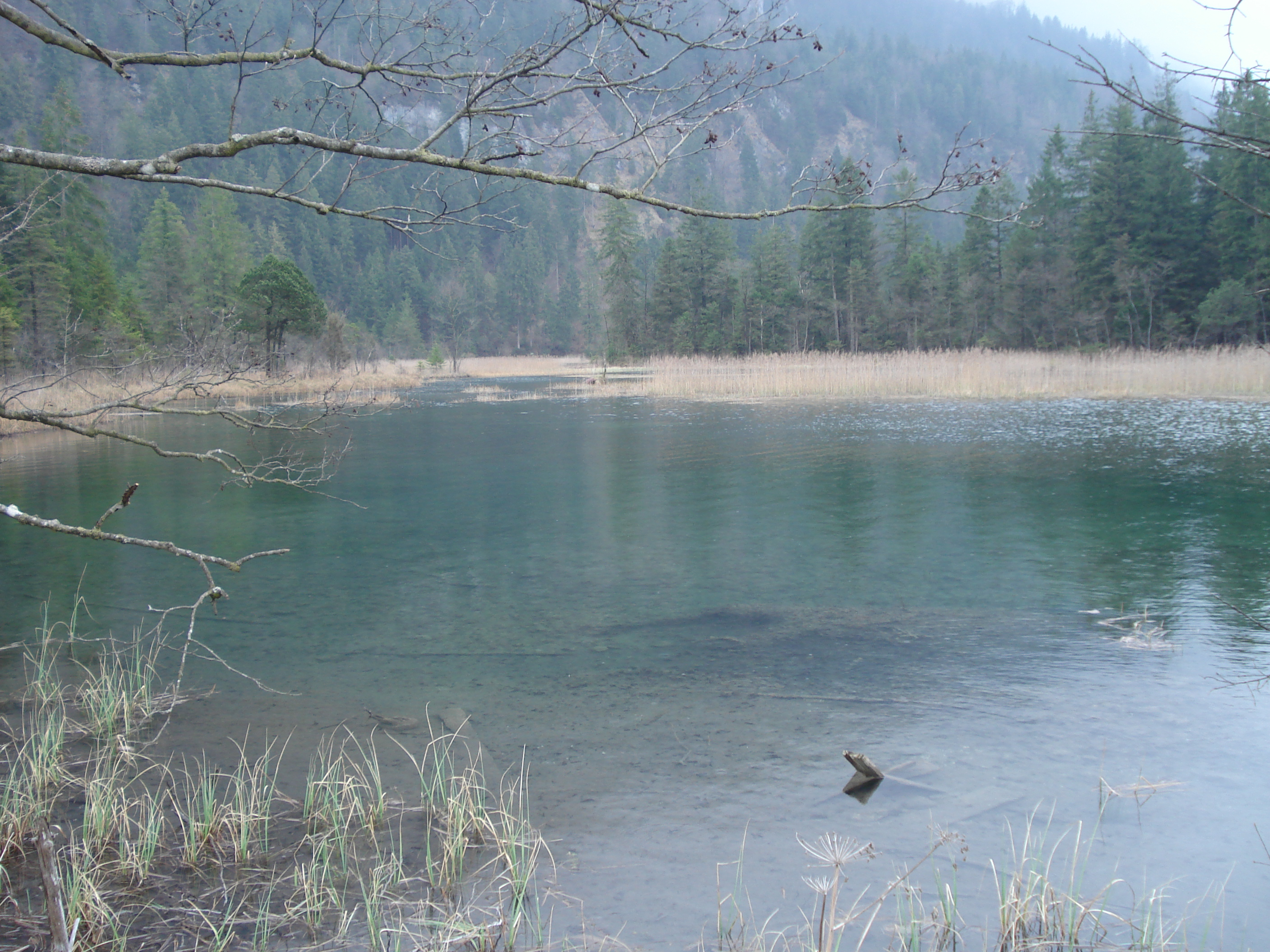 Die sieben Quellen bei Eschenlohe (Geotop). Sulfatgehalt weist darauf hin, dass auch Kontakt mit den gipshaltigen "Raibler Schichten" besteht.